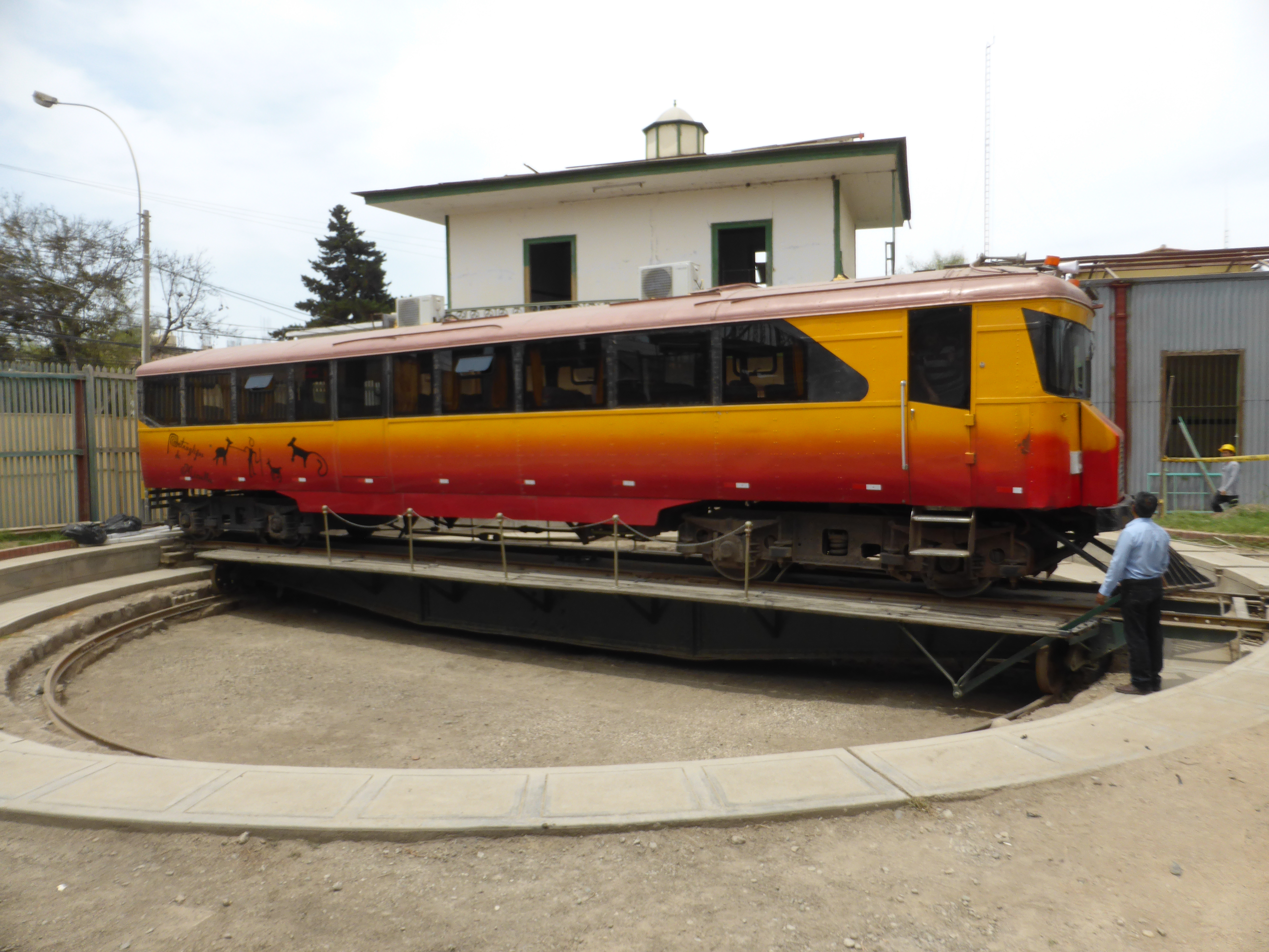 En la estación ferroviaria de Tacna, el "autovagón" turístico 261 se encuentra en la tornamesa o puente giratorio, para invertir el sentido de la marcha. La estación de Tacna es sede del "Museo Ferroviario Nacional de Tacna".